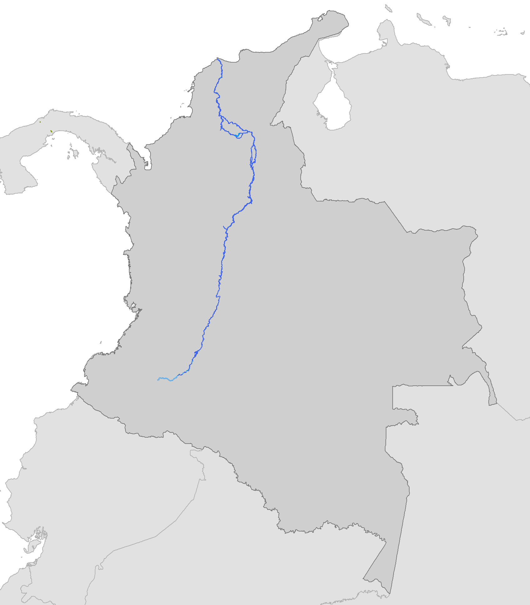 Localización Río Magdalena - Colombia